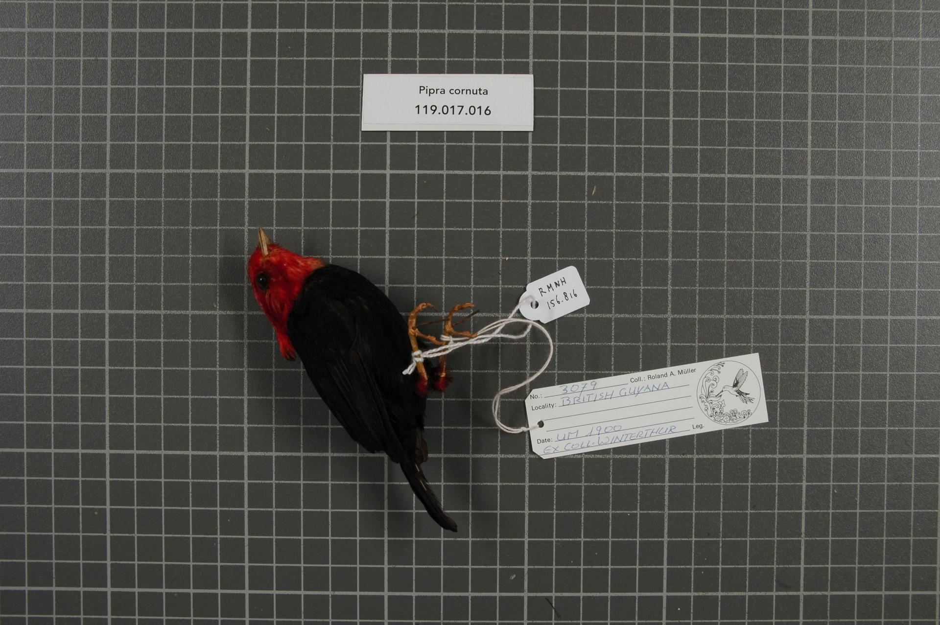 Pipra cornuta Spix, 1825